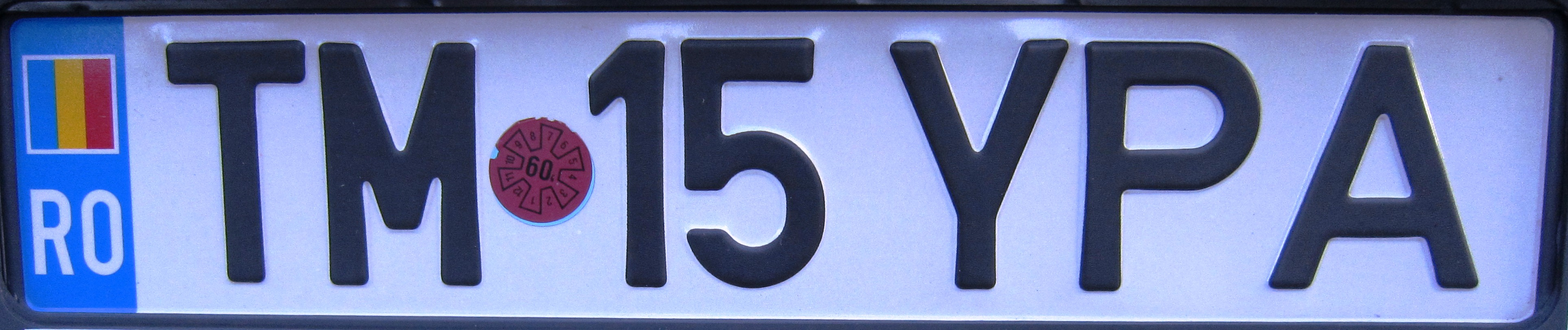 Roemenië oude kentekenplaat TM 15 YPA